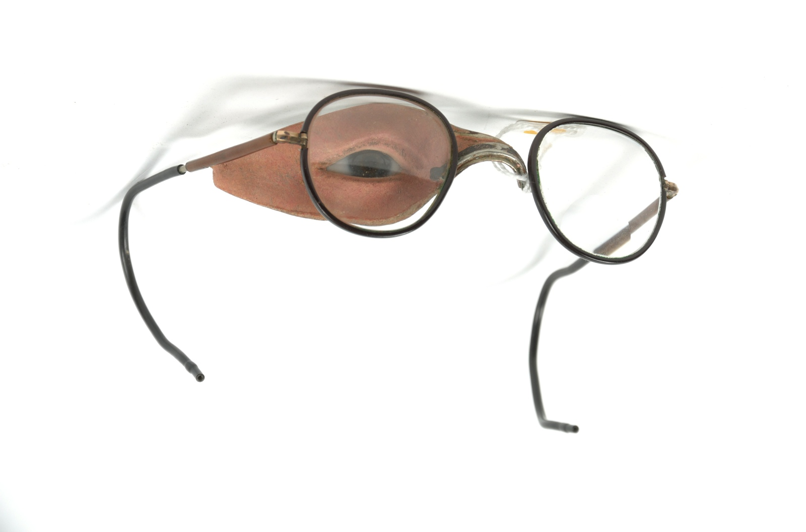 Johannes Esser Vanaf 1915 tot in de Tweede Wereldoorlog, Duitsland. Het verhaal Johannes Esser was een Nederlandse arts. Helaas is er weinig over hem bekend in Nederland. Almar Seinen vindt dat deze persoon onderbelicht is gebleven, want hij heeft veel betekend voor de plastische chirurgie in Nederland. Er is ook een instituut in Amsterdam naar hem vernoemd, dat ook zijn archief beheerd. Hij heeft veel geopereerd in Duitsland en daar ca 20.000 gezichtsreconstructies gedaan. De geallieerden wilden geen gebruik maken van zijn diensten omdat hij niet beschikte over de juiste papieren. De Duitsers wilden wel graag gebruik maken van zijn kennis. Hij kreeg een hospitaal in Brühl toegewezen. De heer Seinen heeft 7 boeken over dit onderwerp meegenomen. Hij is over Esser gestruikeld min of meer door het voorbereiden van een tentoonstelling over Nederland en de Eerste Wereldoorlog. Het boekjes 'Was Aerztekunst vermag' geschreven door een Duitse soldaat, die aan het gezicht gewond is geraakt in WO1 en is geopereerd door Esser. Het boekje gaat over zijn verwonding en genezing en hij heeft het boekje opgedragen aan zijn arts Esser. 419 Prothese met klein oog en bril